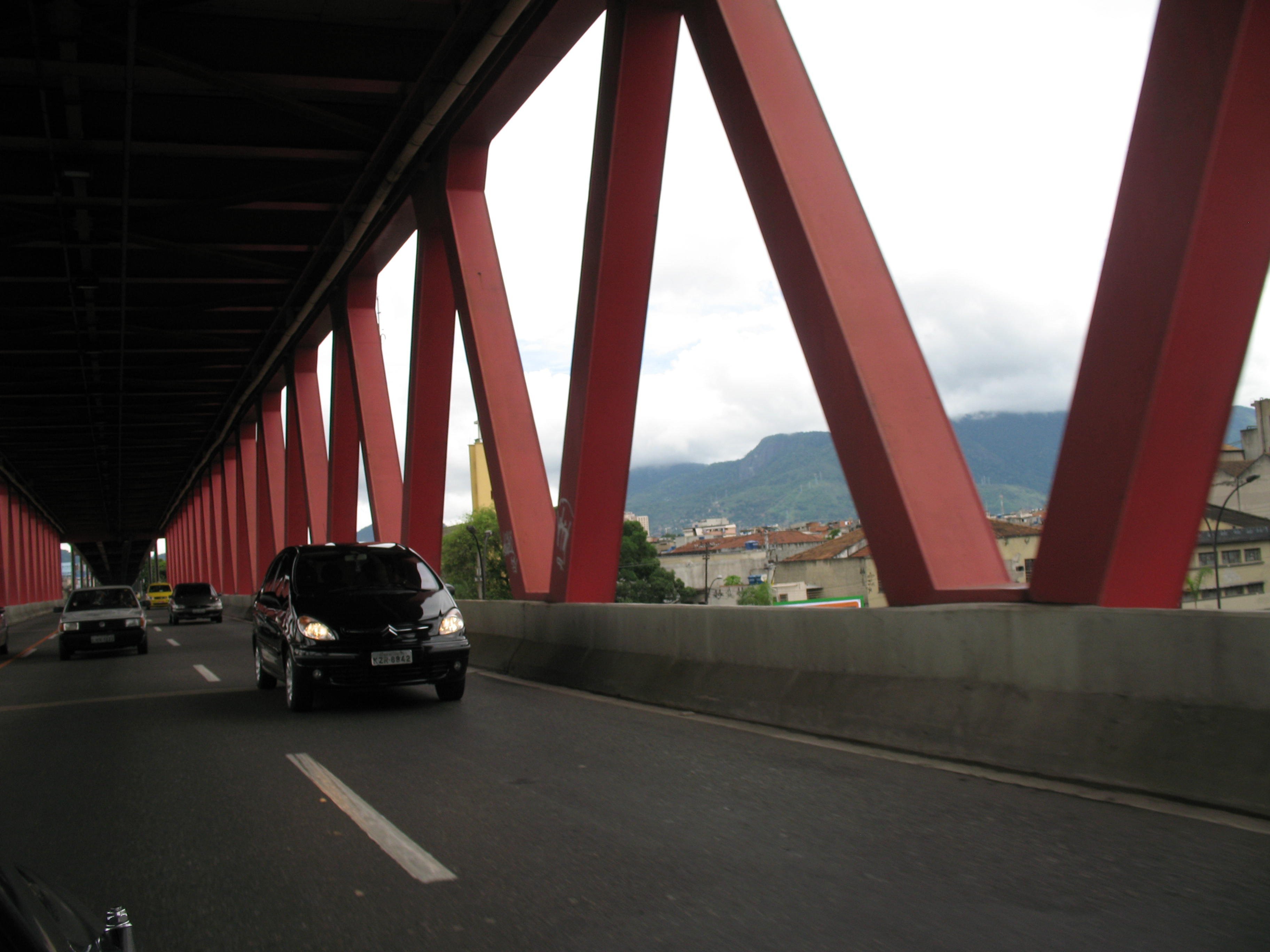 LINHA VERMELHA